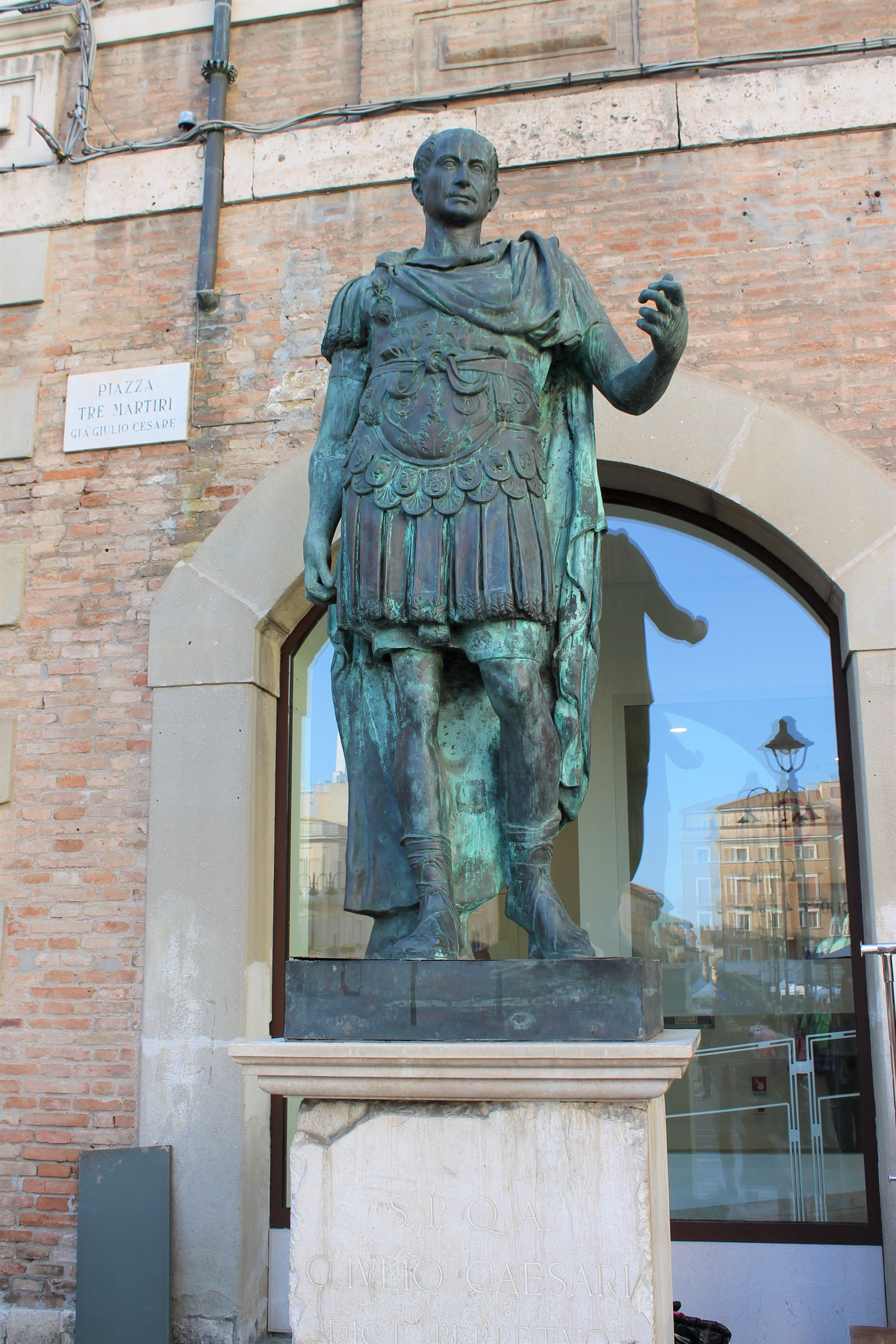 Statua di Giulio Cesare in Piazza Tre Martiri This is a photo of a monument which is part of cultural heritage of Italy.